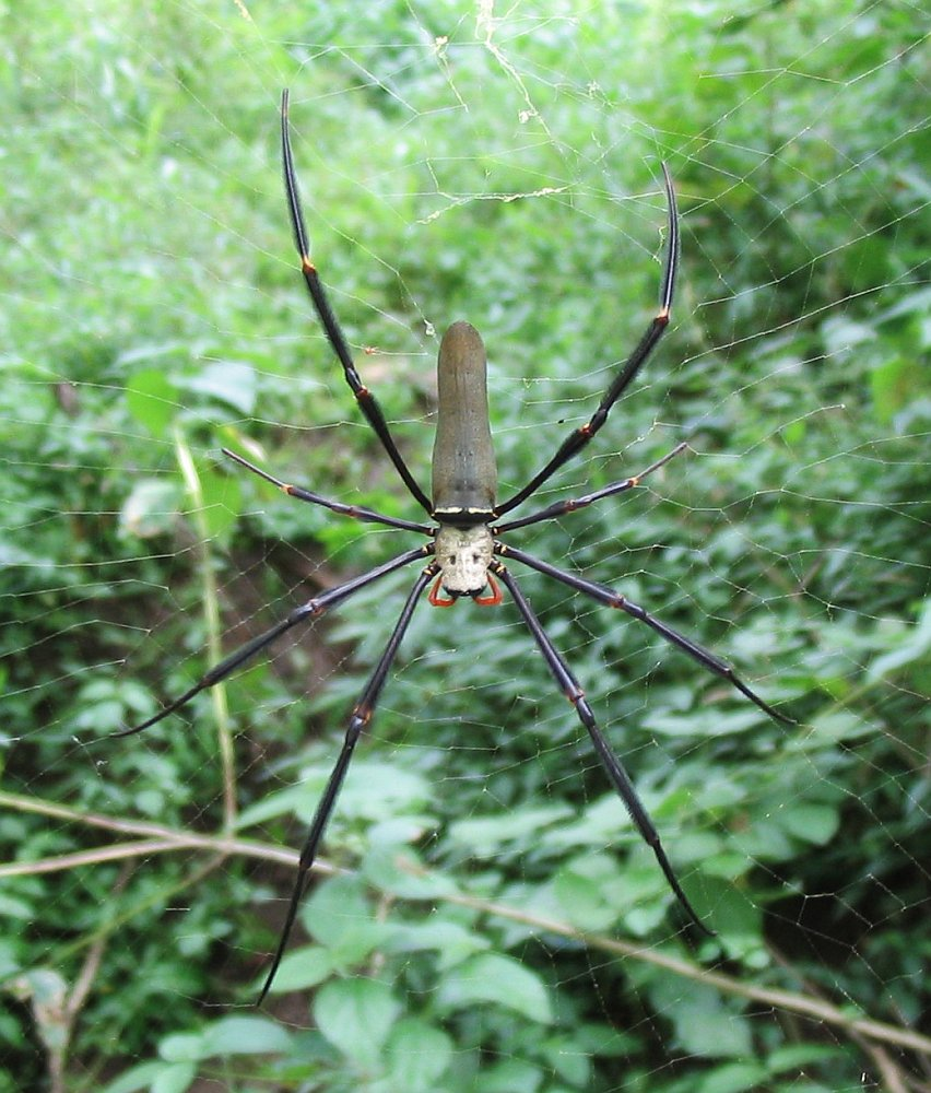 Nephila pilipes